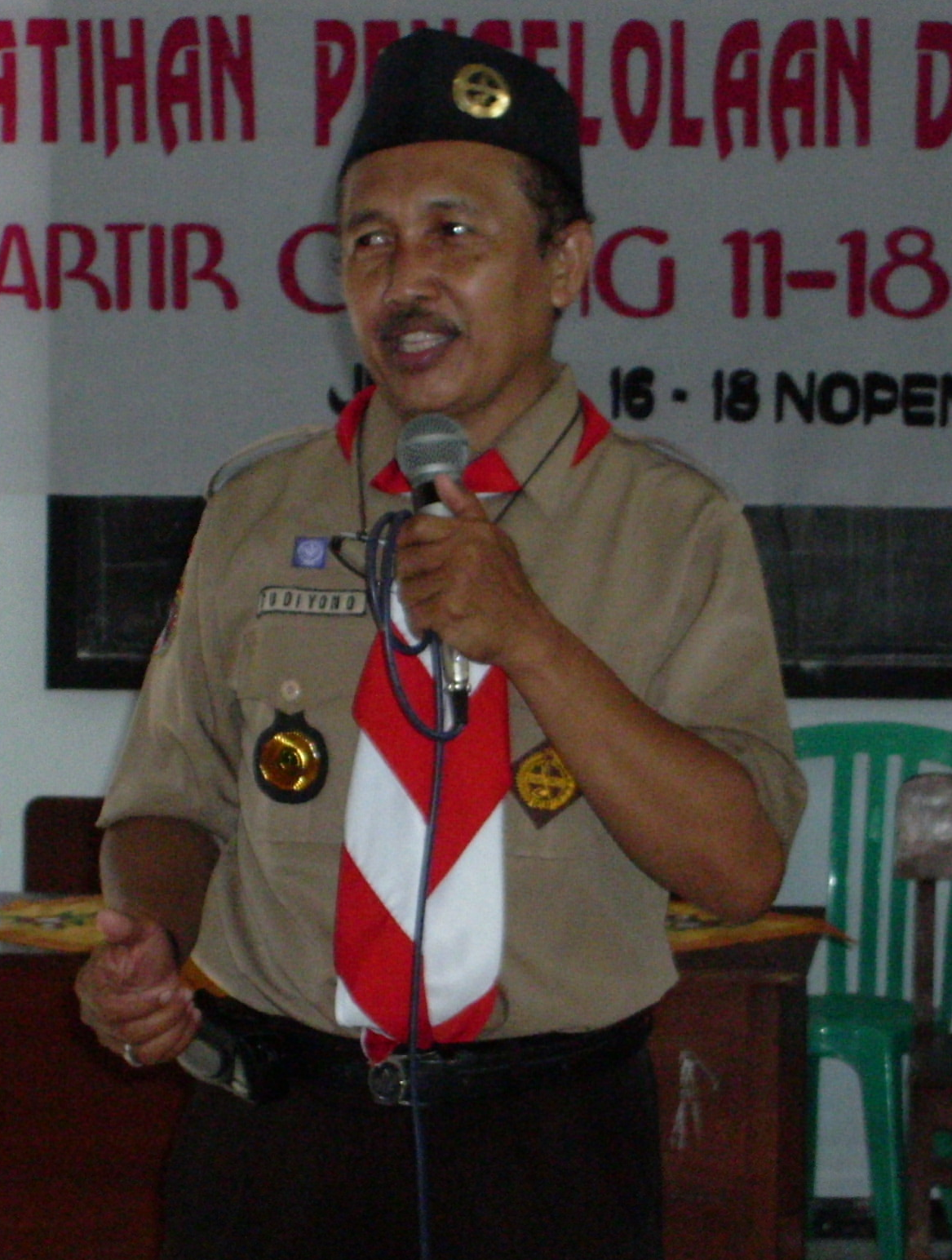 Foto Pembina Pramuka putra